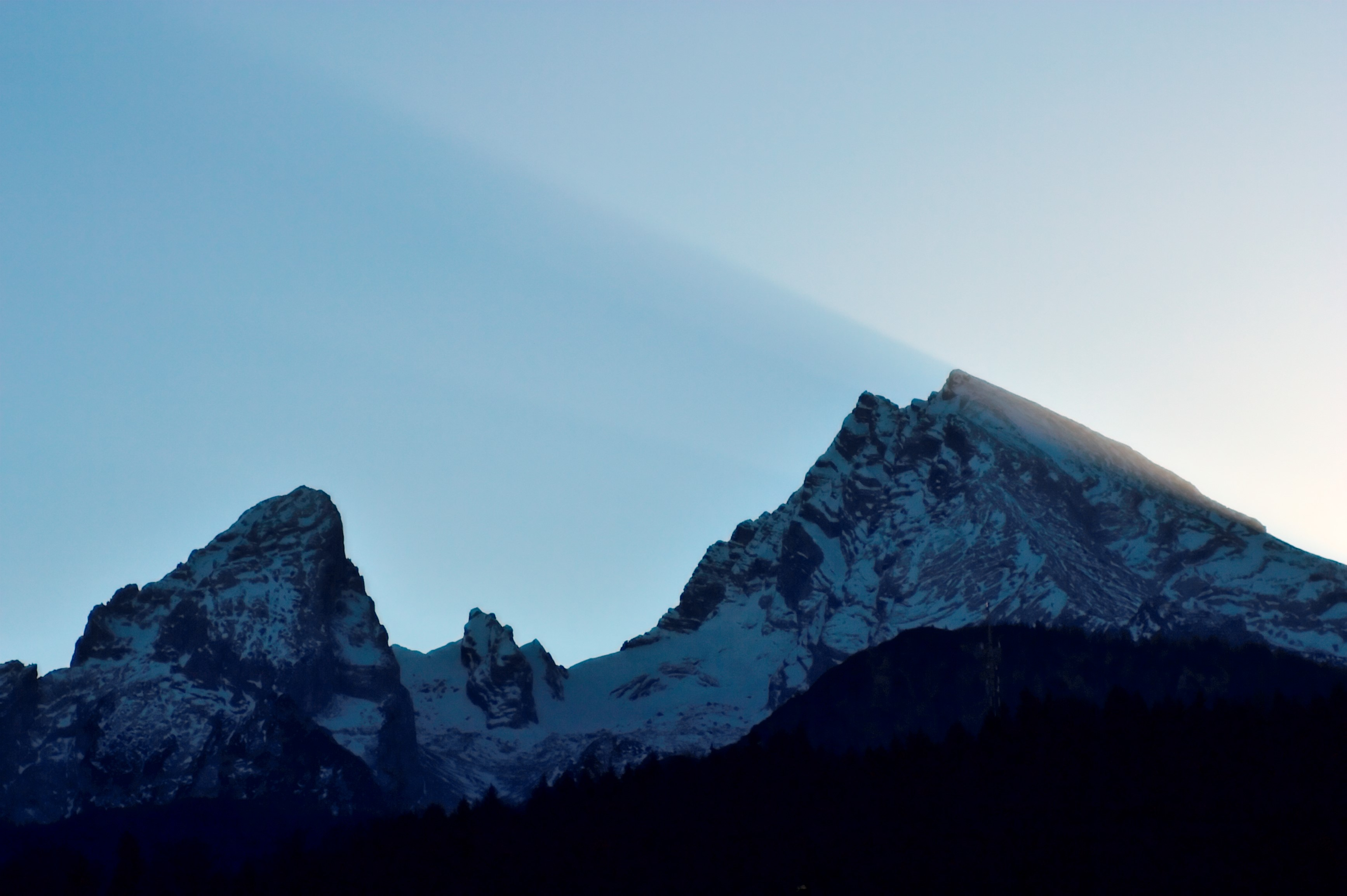 Watzmann kurz vor Sonnenuntergang, man sieht den Schattenwurf des Berges am Himmel